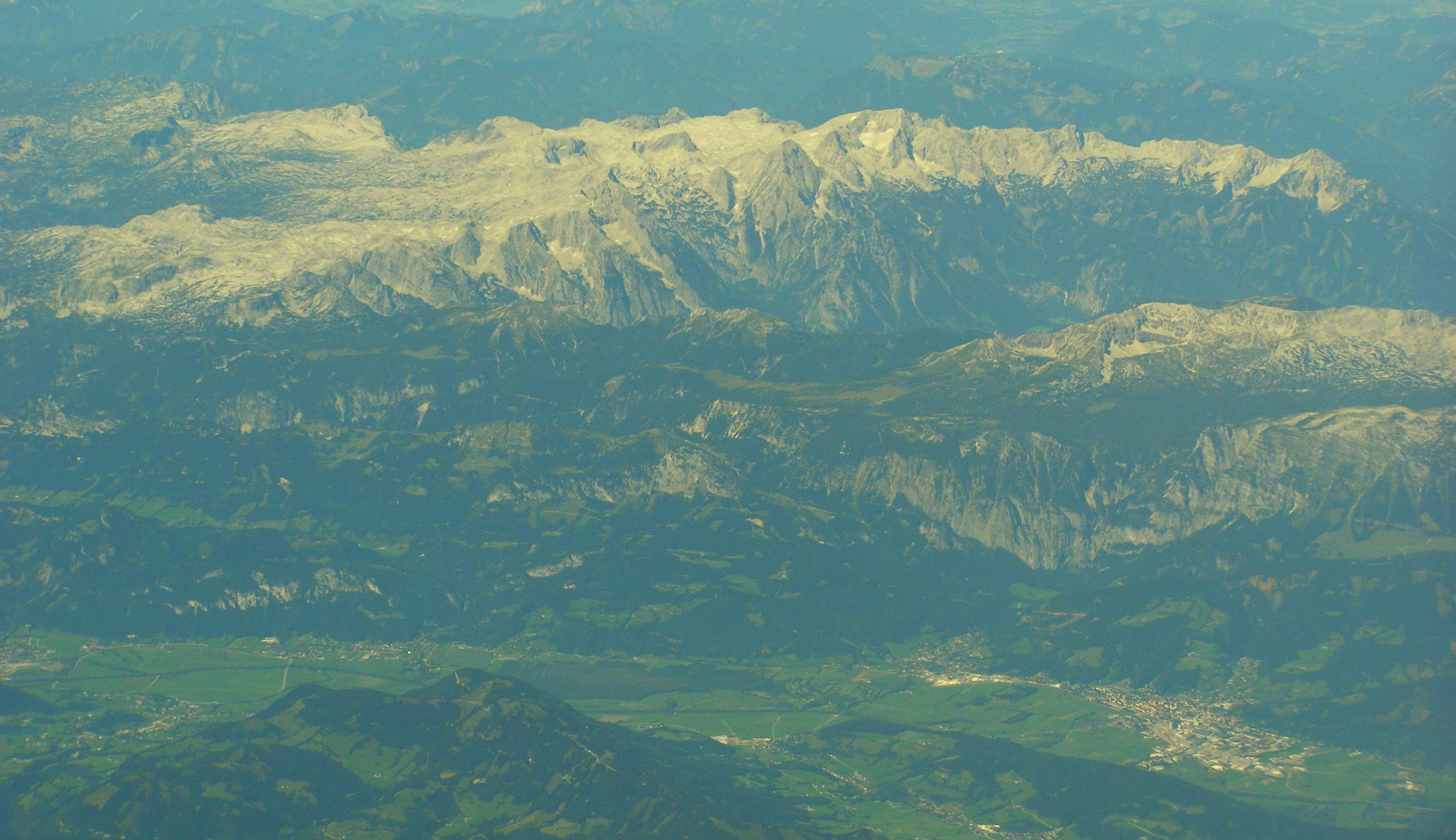 Góry Martwe